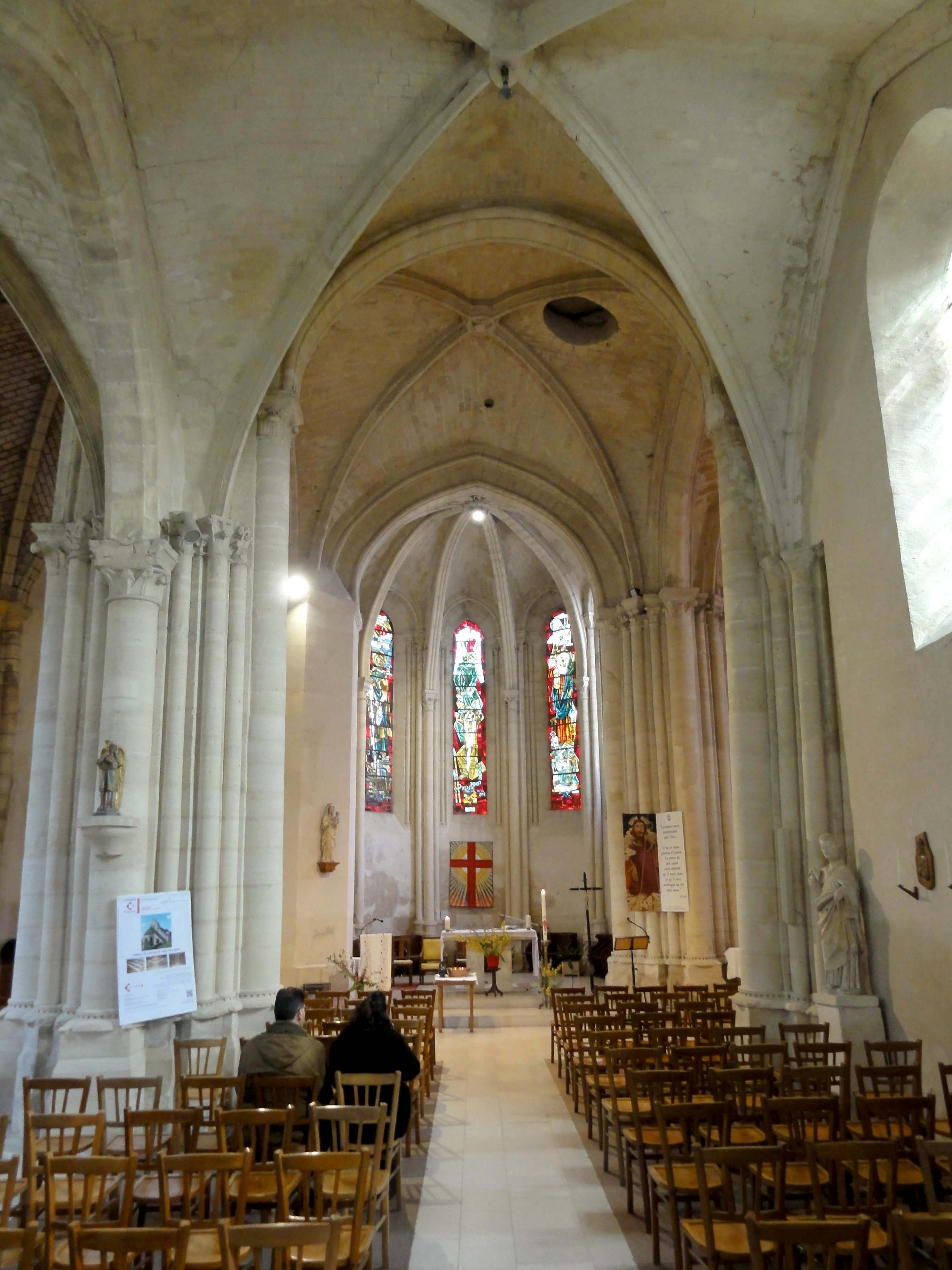 Intérieur de l'église - voir titre.